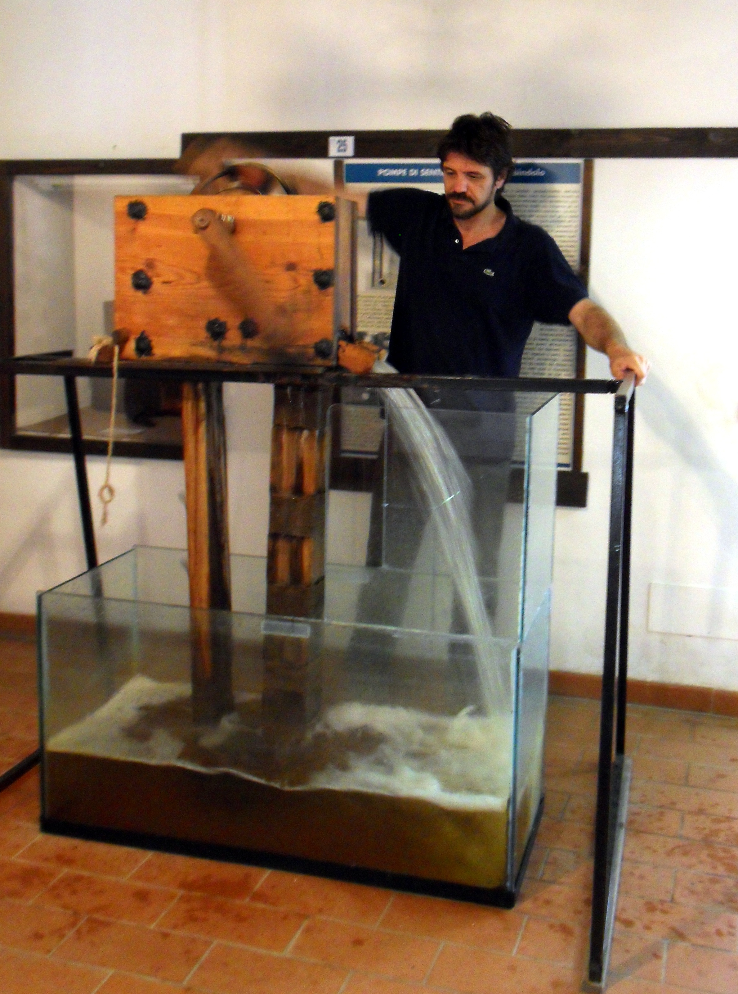 foto